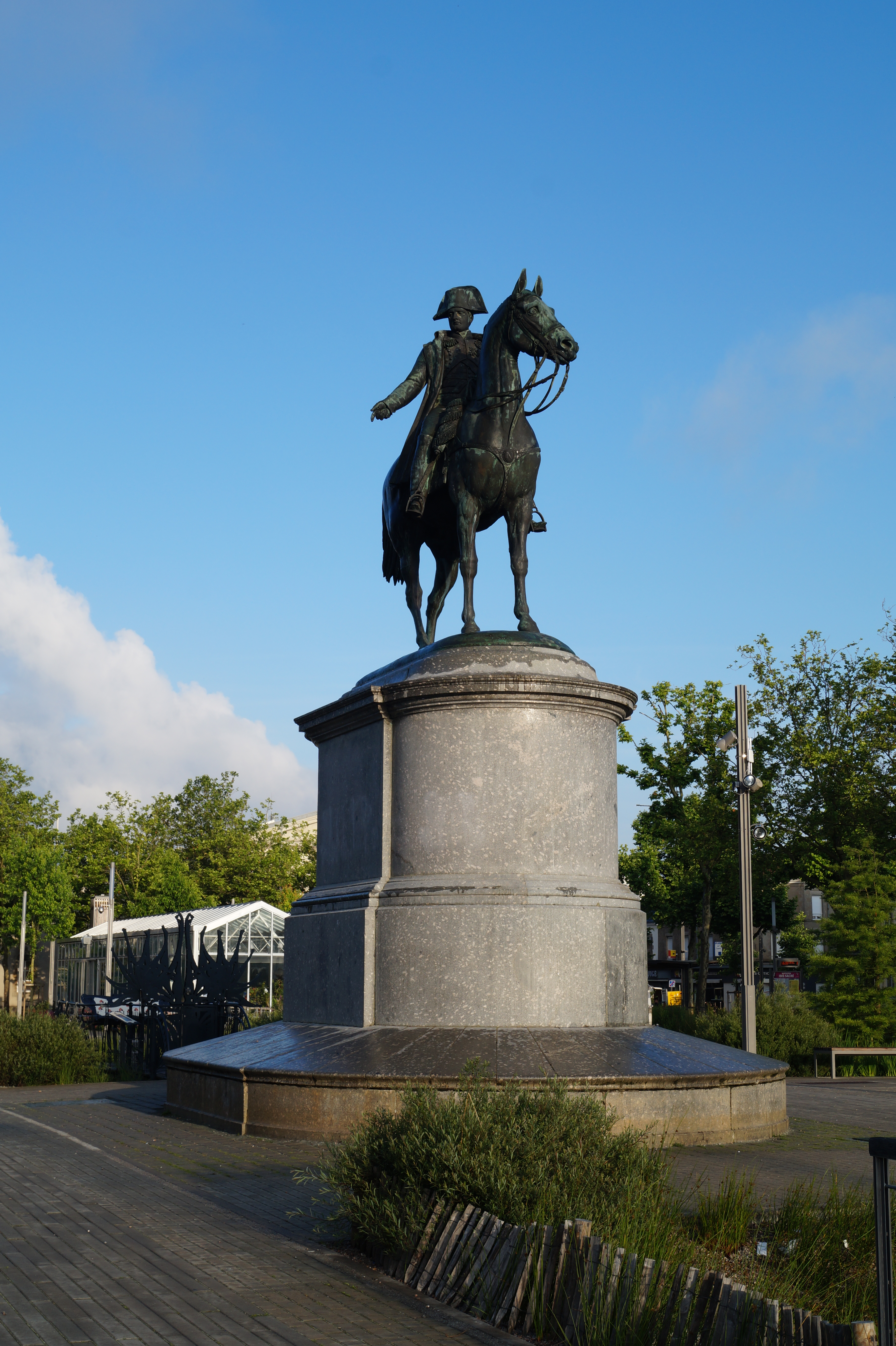 La statue équestre de Napoléon Ier depuis la place Napoléon.